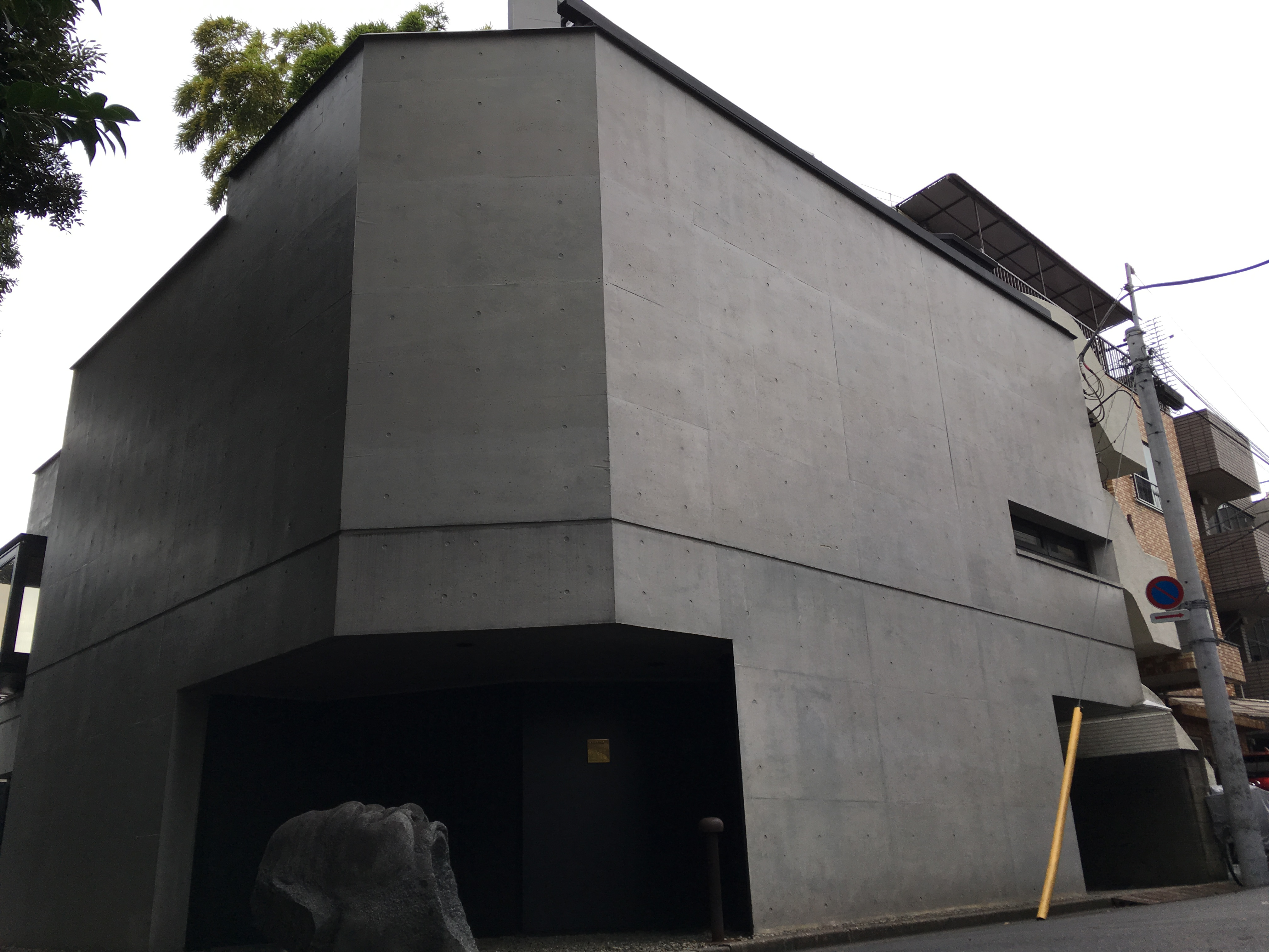 齋藤裕の建築作品